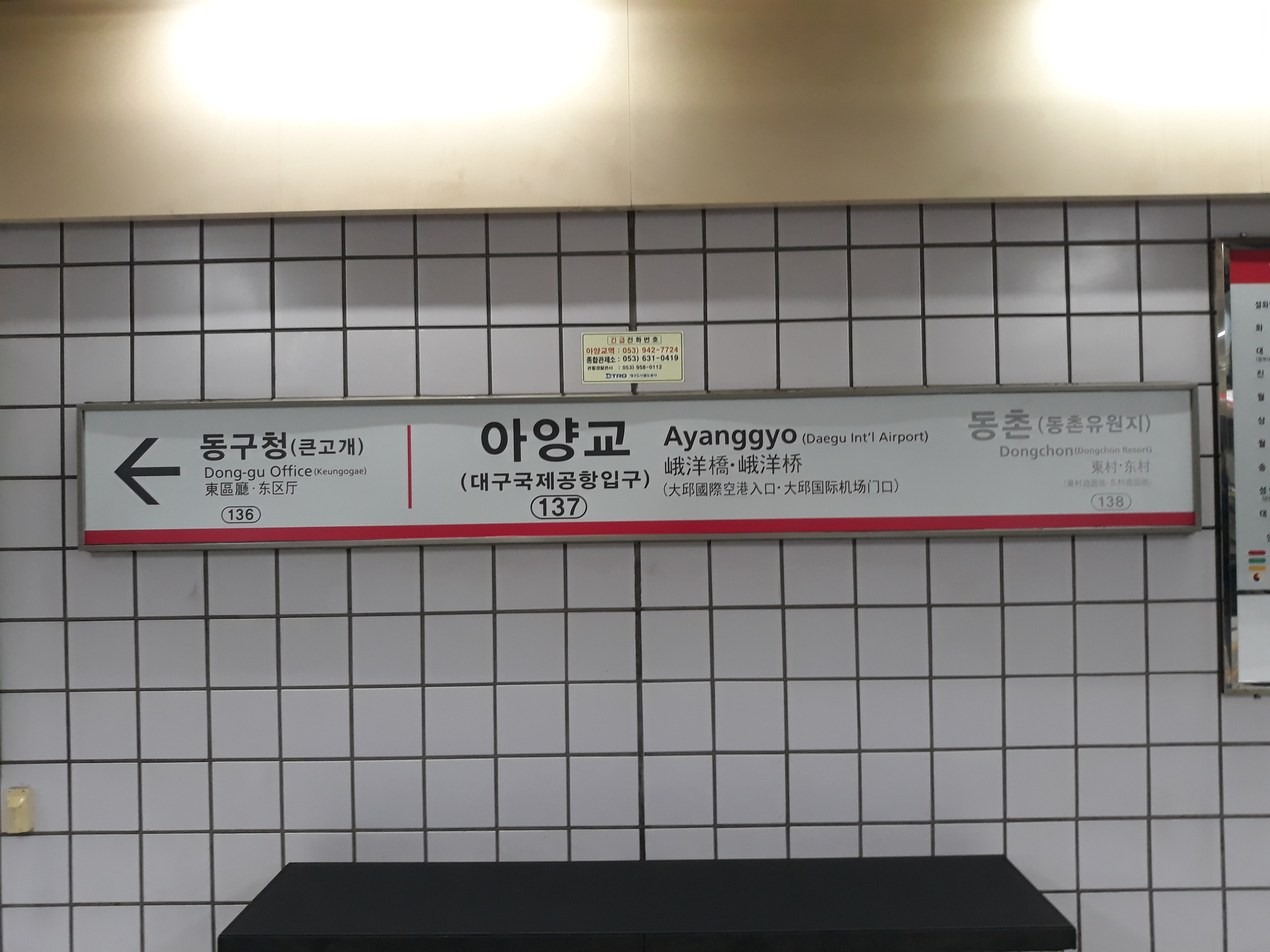 아양교역 역명판(설화명곡 방면)